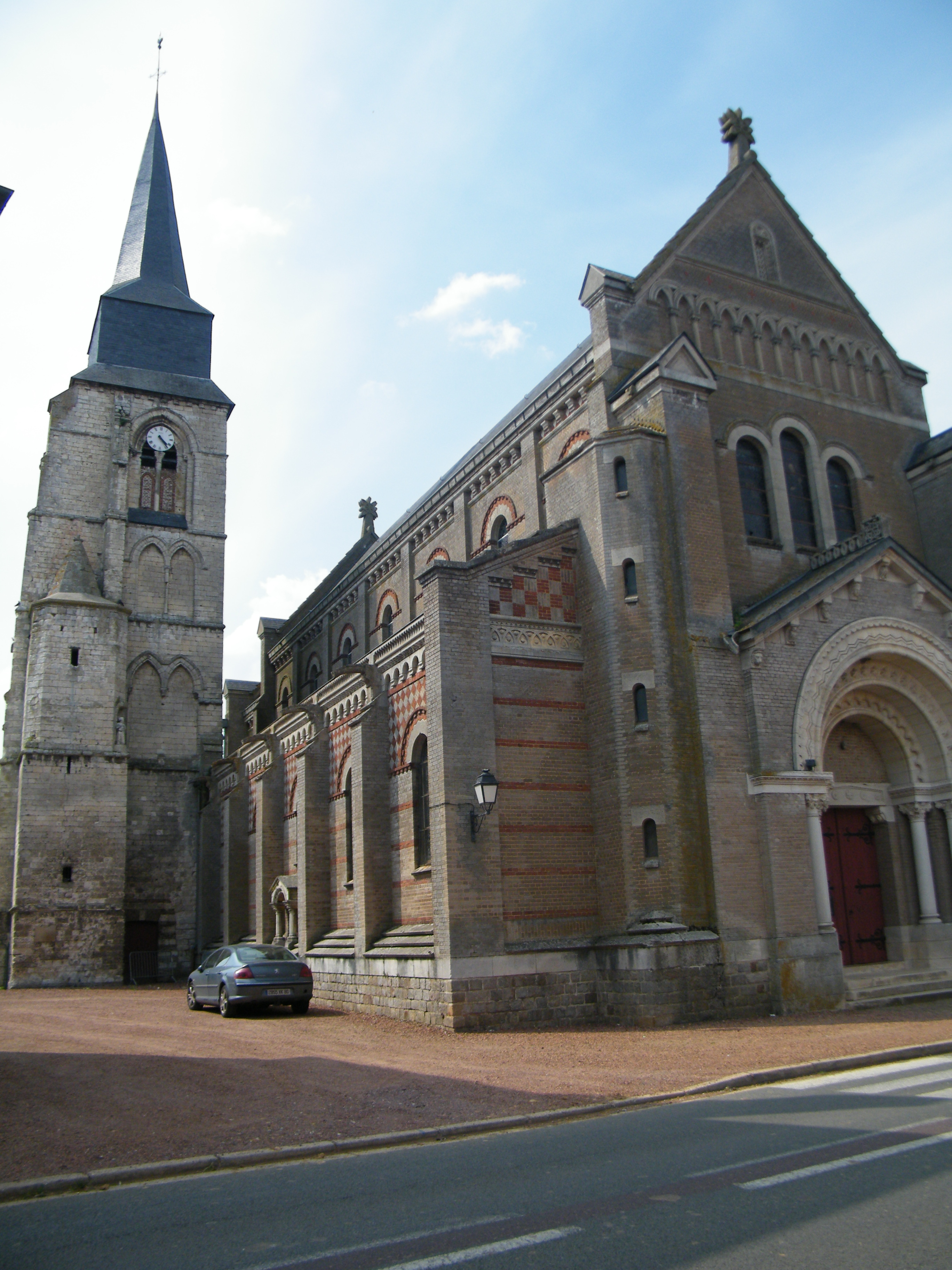 église.